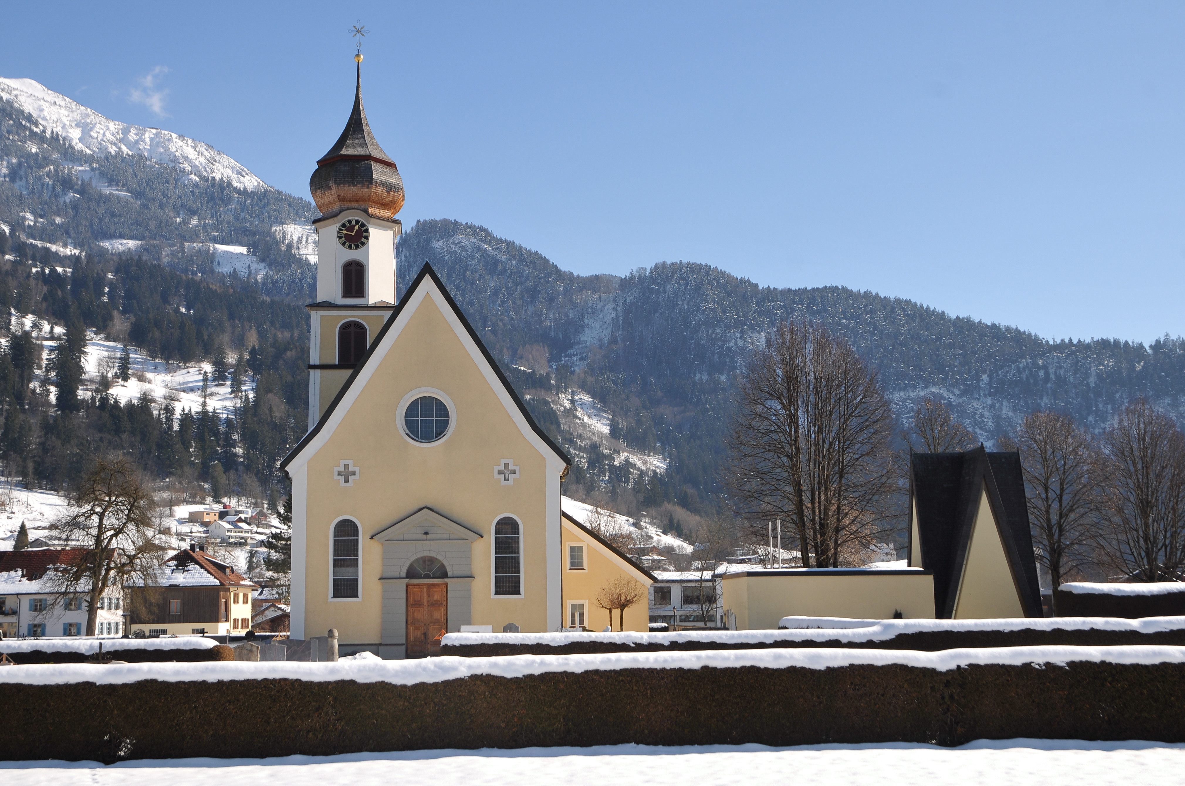 Kath. Pfarrkirche hl. Sebastian mit Friedhof an der Kirchstraße 1 in Ludesch.